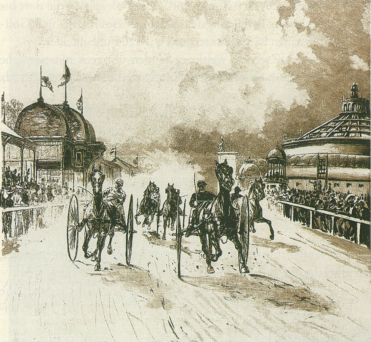 Trabrennplatz Krieau (Wien) Zeichnung aus dem Jahr 1888 rechts im Hintergrund die Rotunde